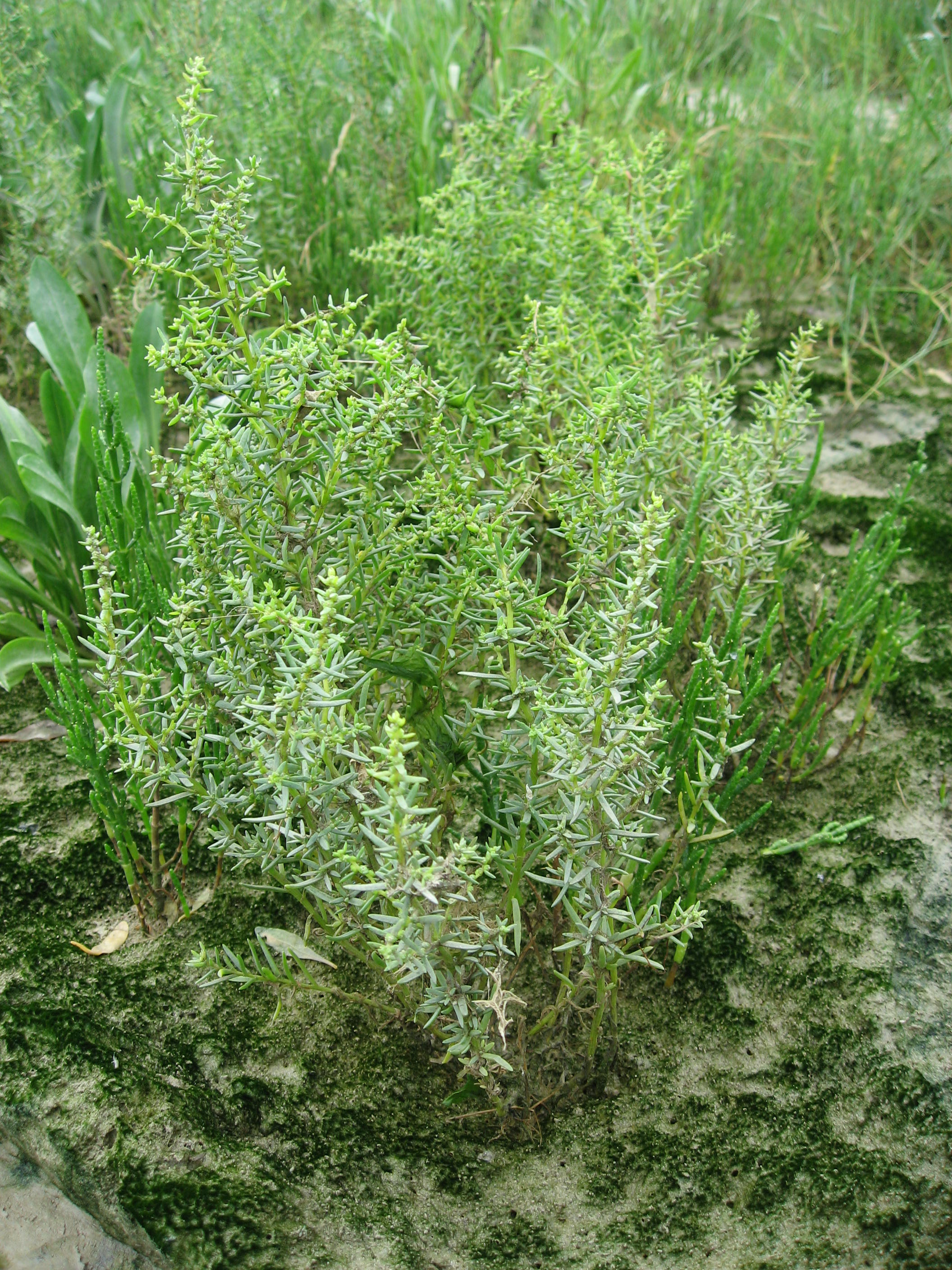 Soude Maritime (Suaeda maritima) in Baie de Somme Map: 50° 11' 40" N 1° 38' 54" E